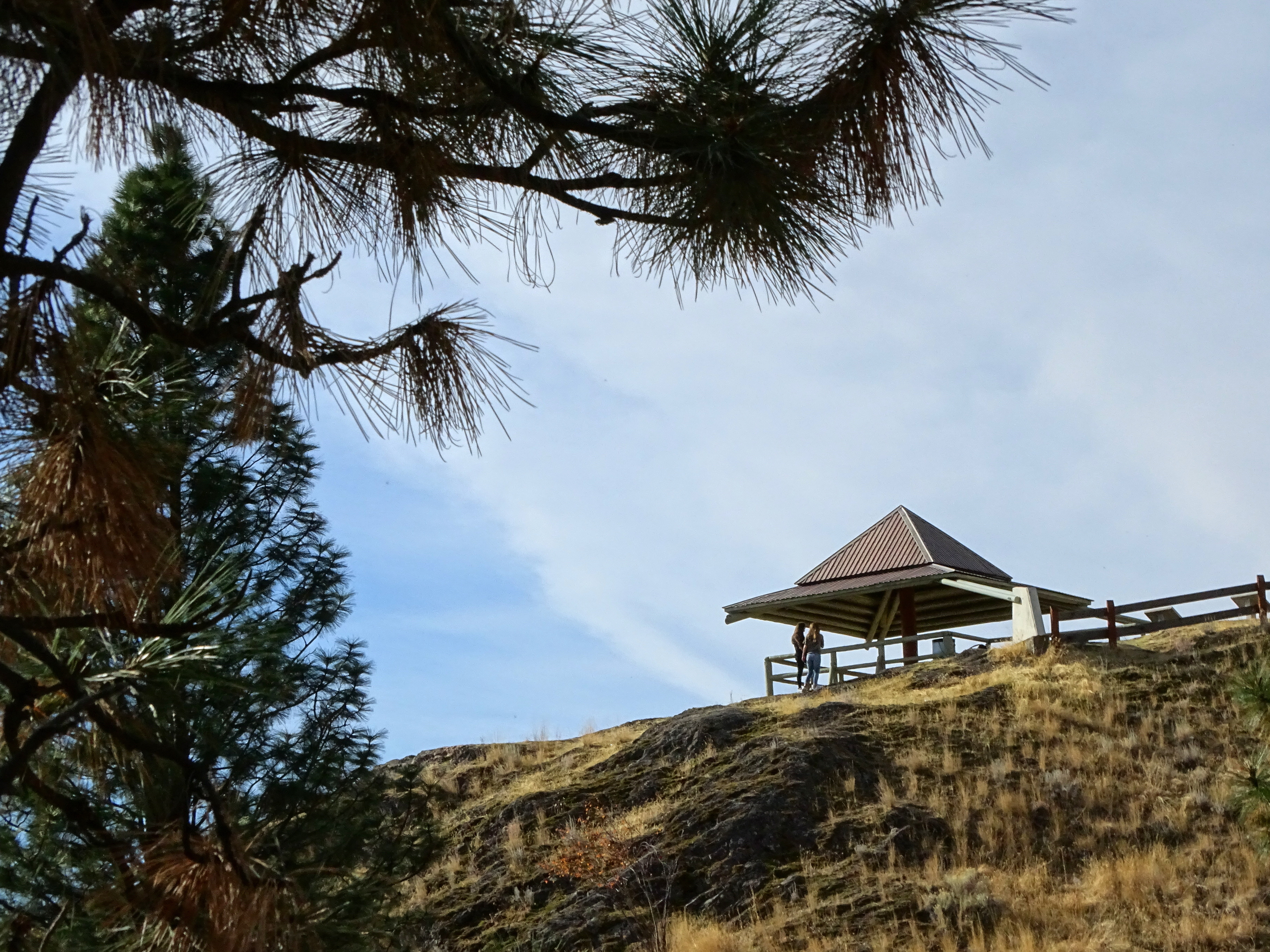 Autumn at Knox Mountain Park - Kelowna - BC - Canada - 05